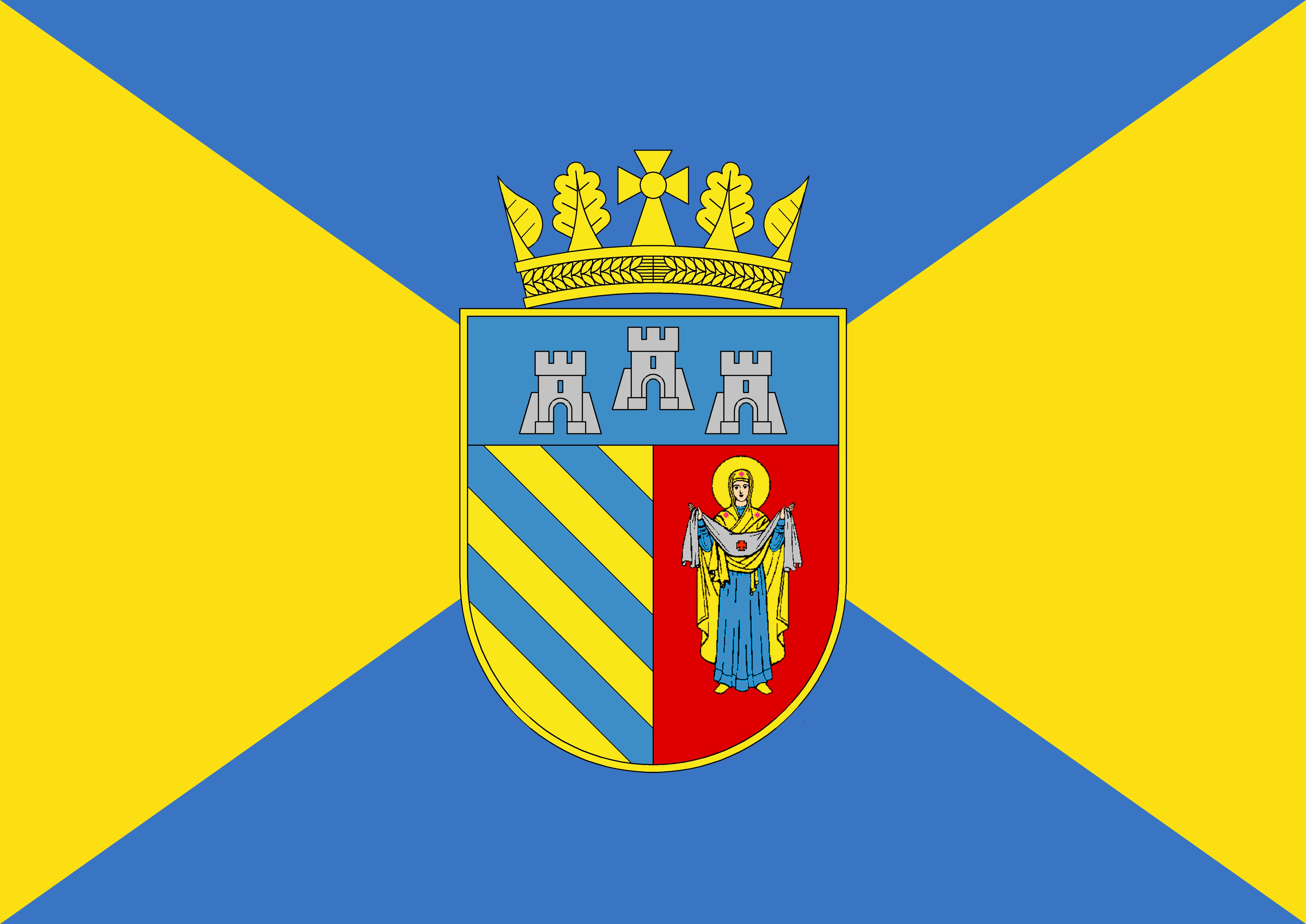 прапор Чортківського району